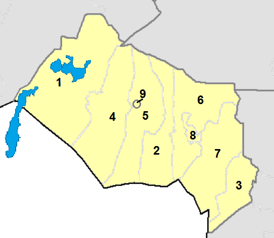 Административная карта Кызылординской области Казахстана